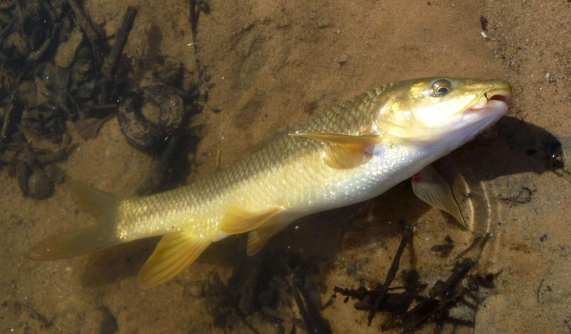 BARBEL. (Barbus meridionalis )